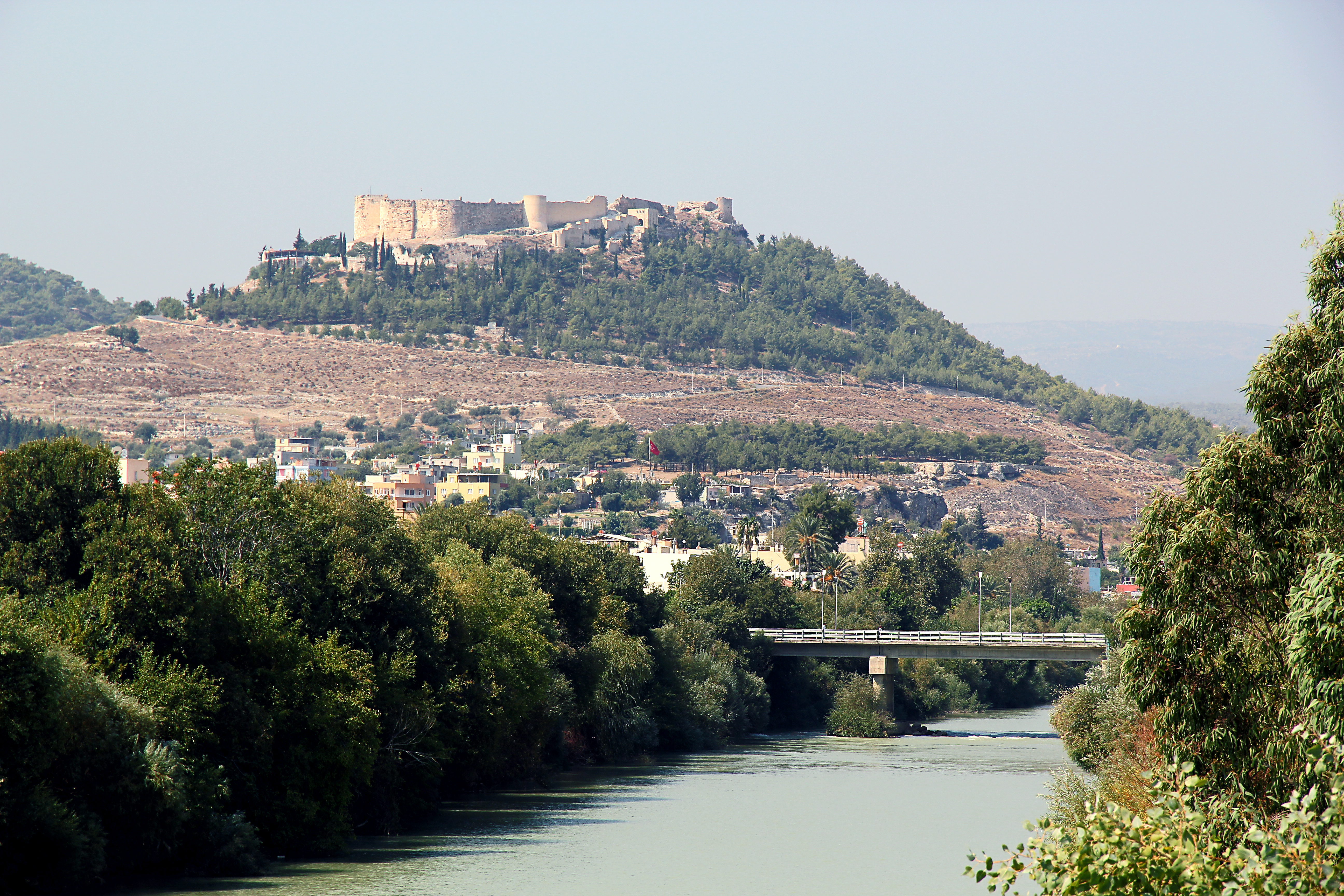 Burg von Silifke, Südtürkei